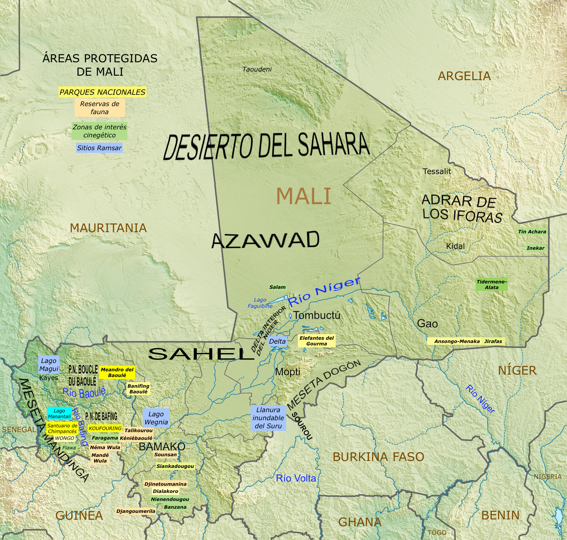 Áreas protegidas de Mali con parques, reservas, zonas de interés cinegético y sitios Ramsar